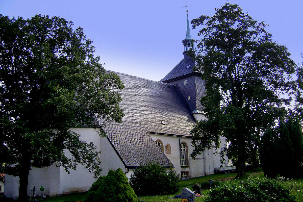 St.-Gallus-Kirche in Sadisdorf